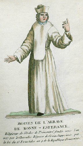 Collection de costumes de tous les ordres monastiques, supprimés à differentes époques, dans la ci-devant Belgique, Bruxelles, Philippe Joseph Maillart et sœur, 1811